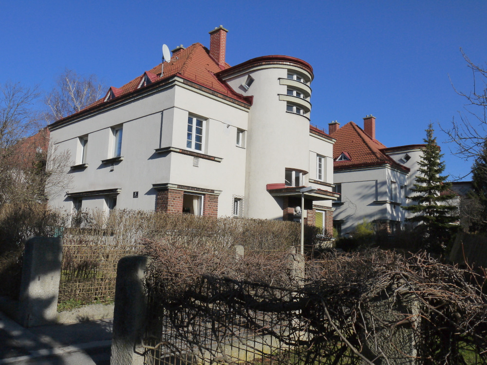 Am Tivoli